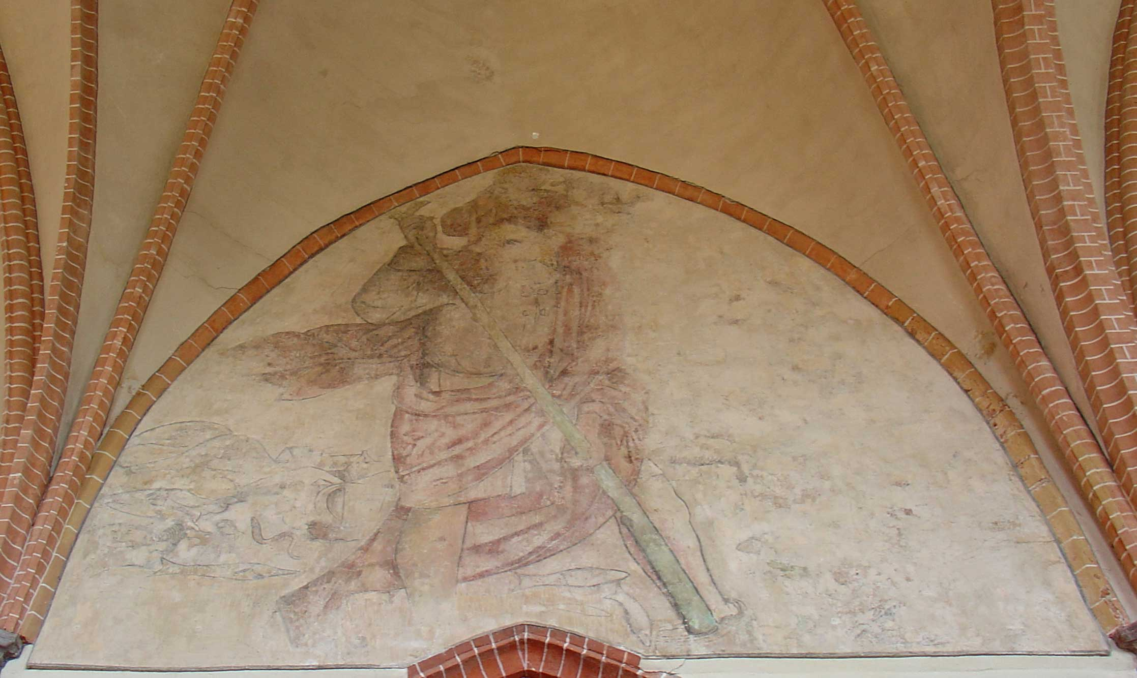 Christoffel (schildering in de kerk van Kollum)